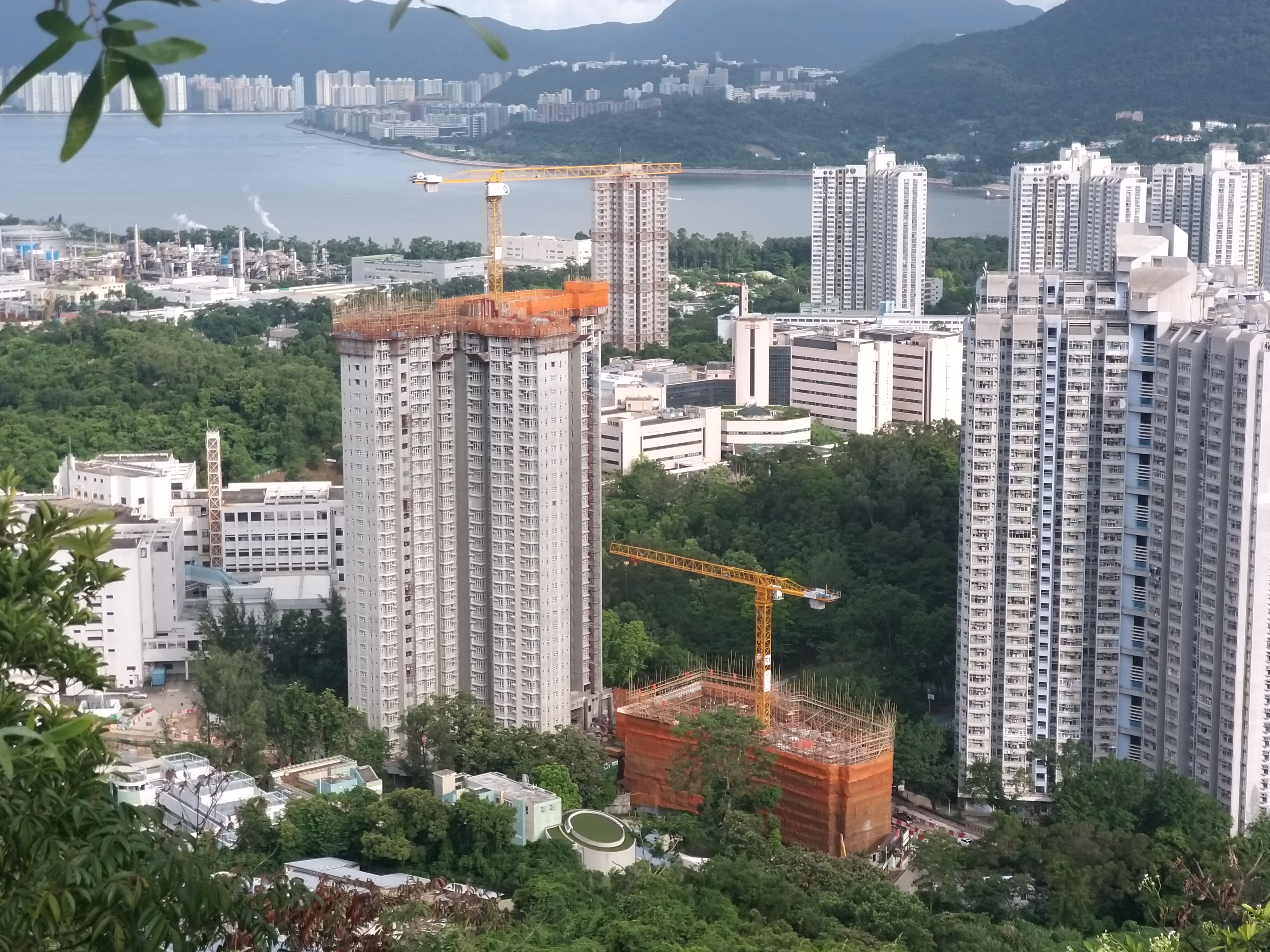 高度與富亨邨樓宇相若